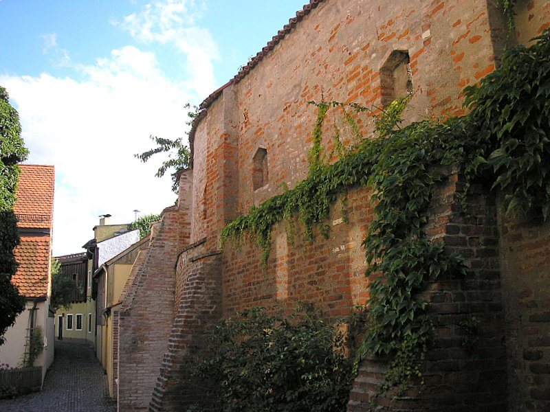 Stadtbefestigung Friedberg (Landkreis Aichach-Friedberg, Bayerisch-Schwaben). Innenseite der Westmauer nach Süden. Eigene Aufnahme, Jan. 2007 / Friedberg city walls (Bavaria, Germany). Western wall from inside, looking south. Own photo, Jan. 2007